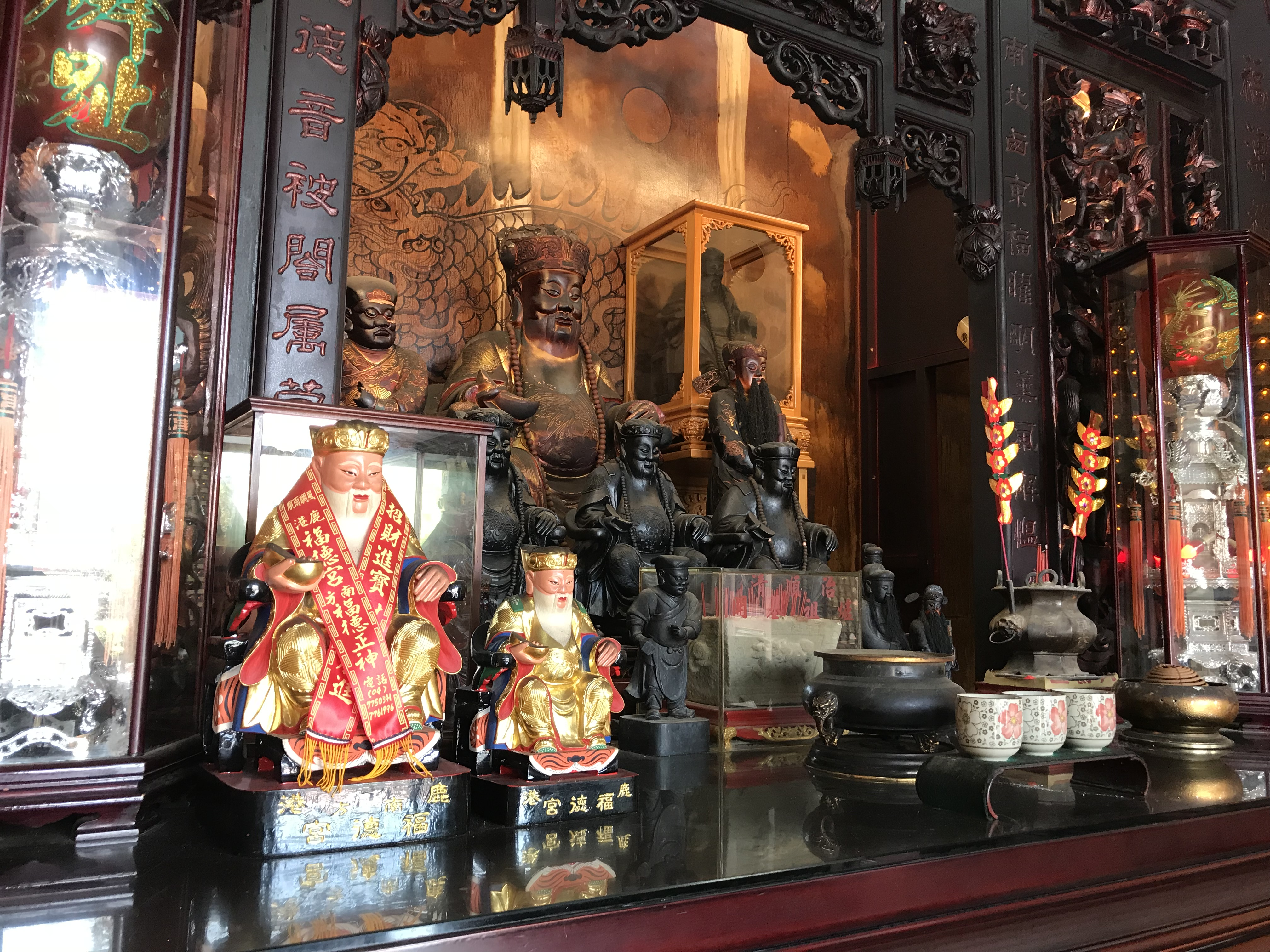 鹿港福德宮神像